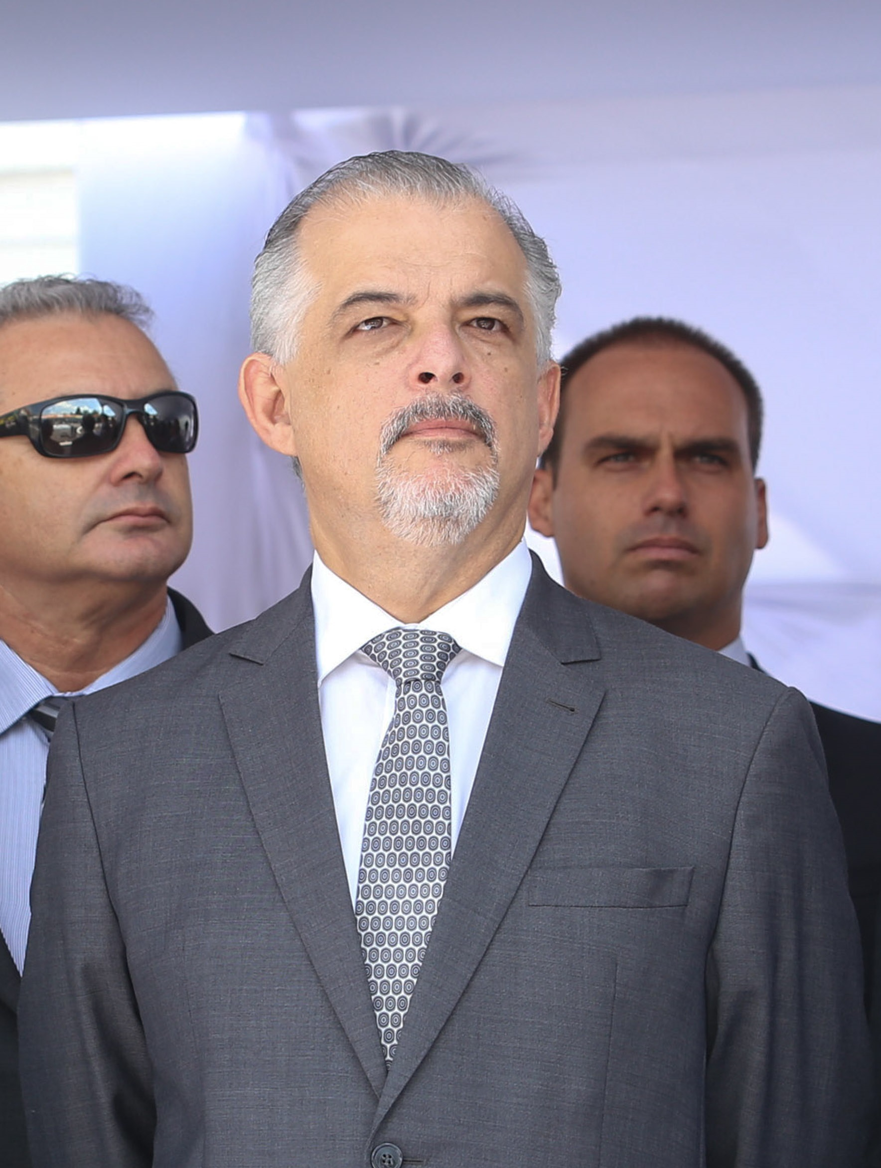 O vice-governador do Estado de São Paulo, Márcio França e o secretário de Estado da Segurança Pública, Mágino Alves Barbosa Filho, participam da Solenidade de Formatura dos Alunos do Curso de Formação de Oficiais ( bacharelado em Ciências Policiais de Segurança e ordem Pública) Turma " Cel PM Francisco Júlio de Alfieri", realizada na Academia de Polícia Militar do Barro Branco. Local: São Paulo/SP Data: 15/12/2017 Foto: Gilberto Marques/A2img